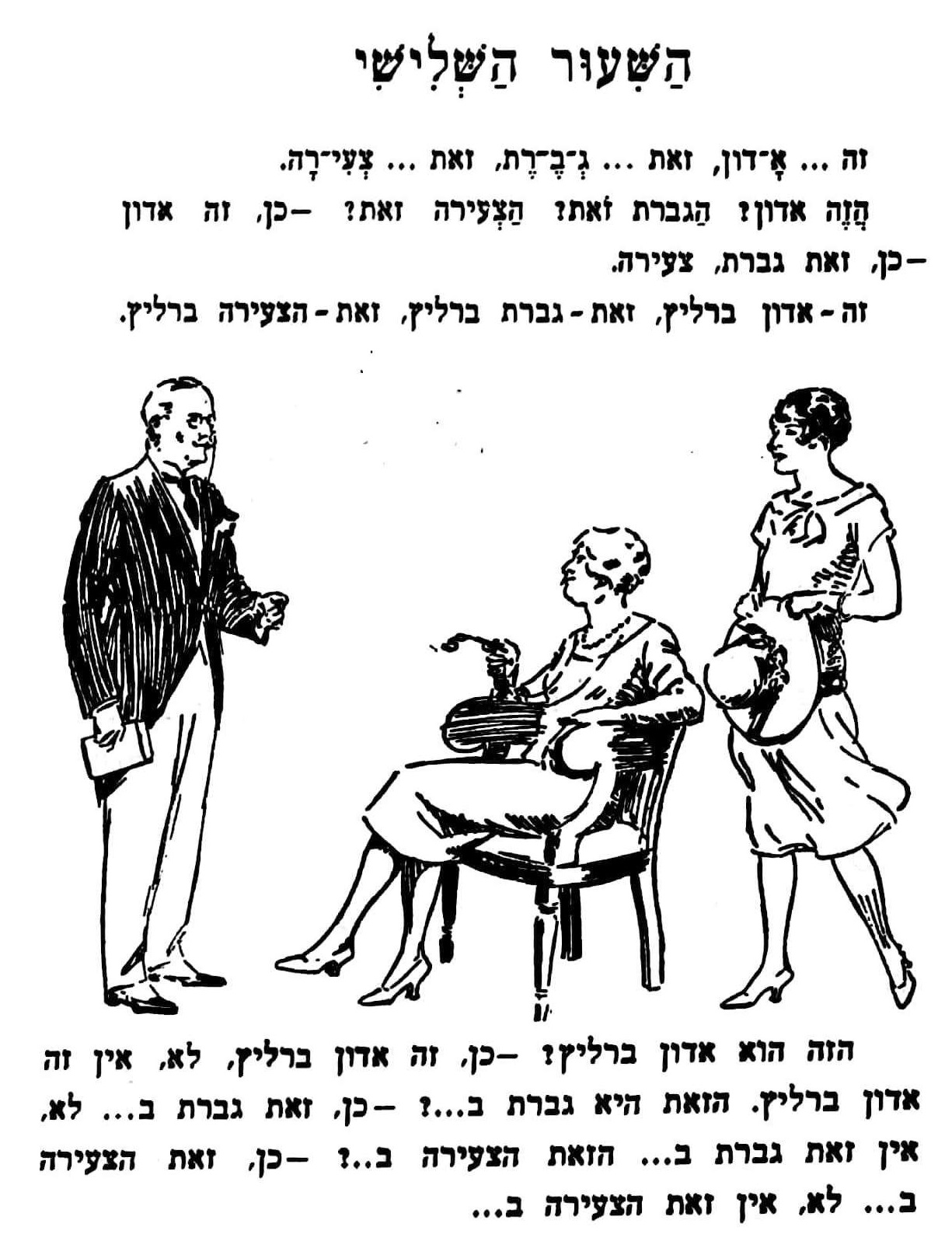 שיעור בעברית